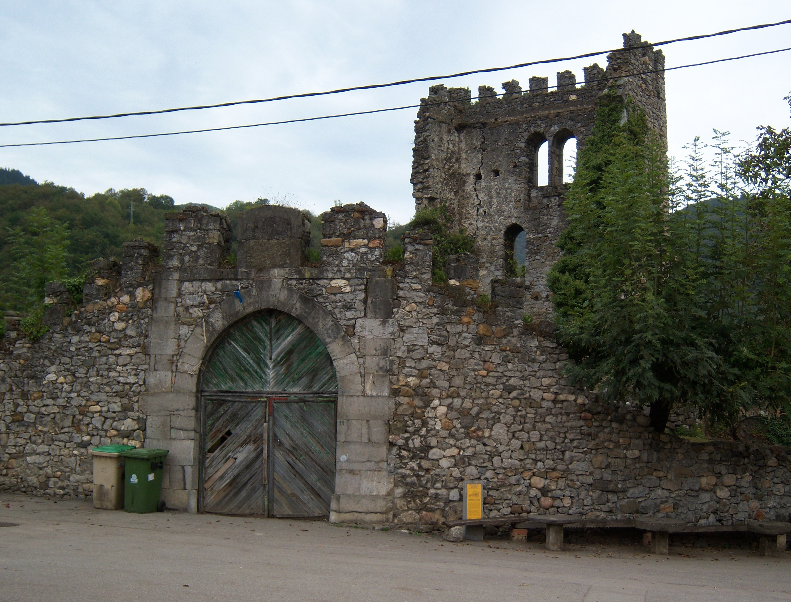 Entrada principal al castillo y muralla. Declarado Bien de Interés Cultural en 1975, Soto, concejo de Aller, Asturias. No se puede entrar dentro, además hay perros y gallinas, por si queréis hacer una visita ya lo sabéis, los paisaninos que hay sentados en las mesas de delante de la muralla pueden informaros de lo que queráis.